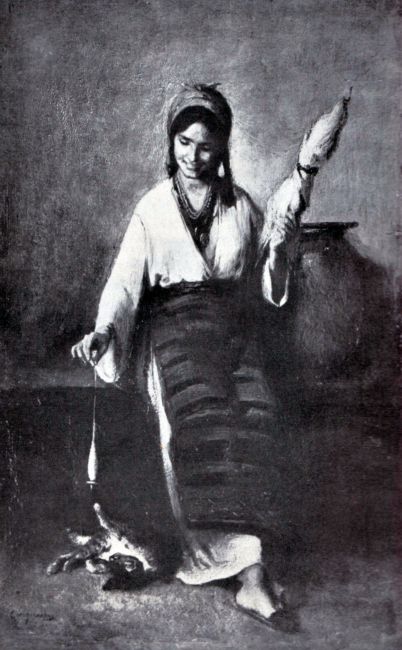 La amândouă le place jocul, ulei/lemn, 35x22cm, semnat stânga jos cu brun - Colecție particulară